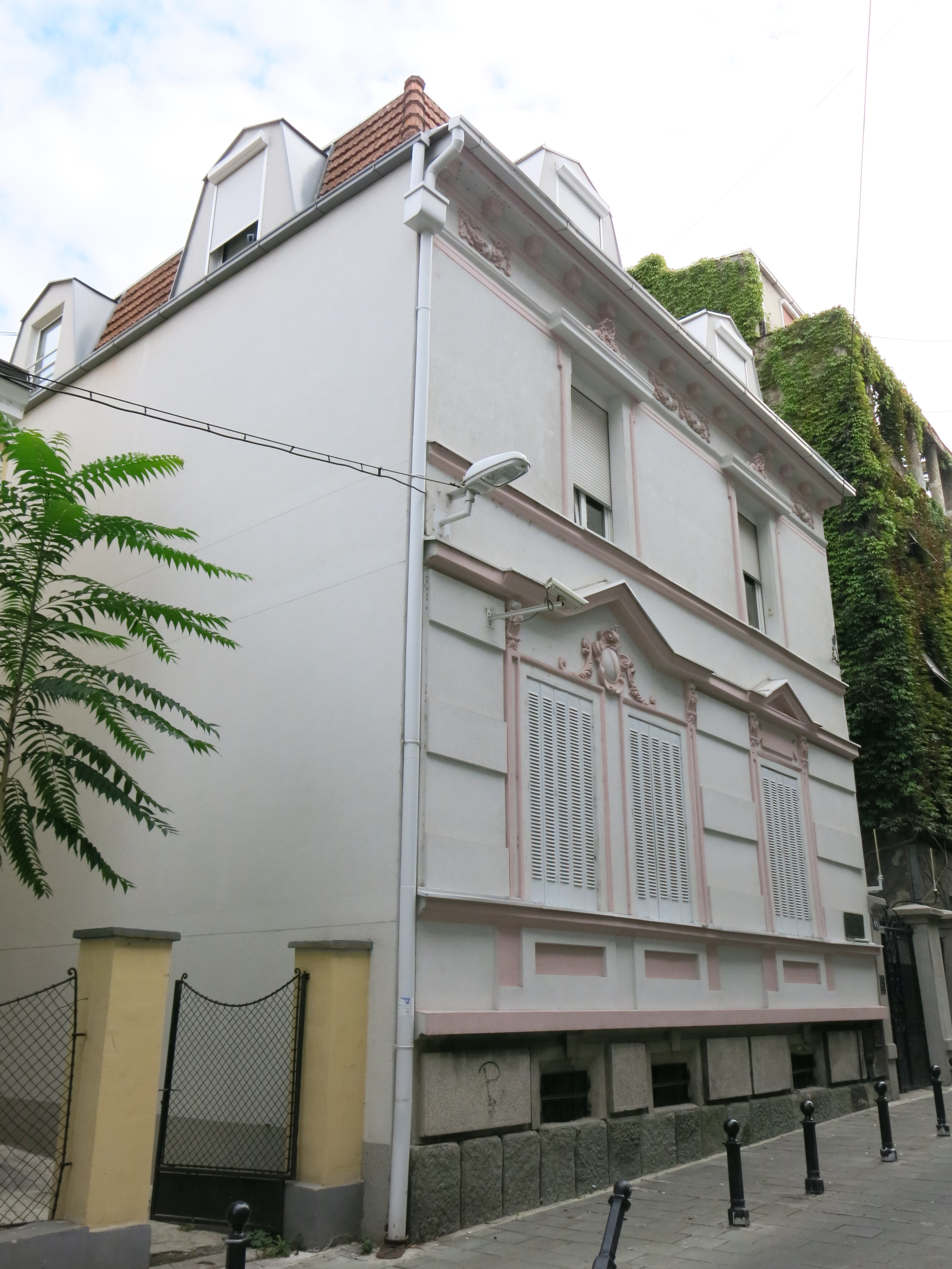 Кућа Богдана Гавриловића